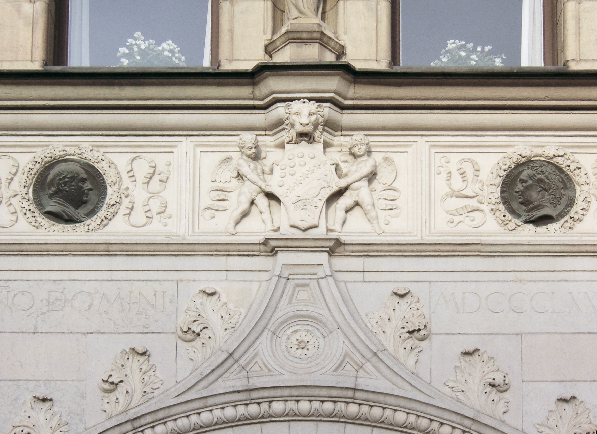 Bünsowska huset: porträtt av Friedrich Bünsow och hans hustru Allona över port 31